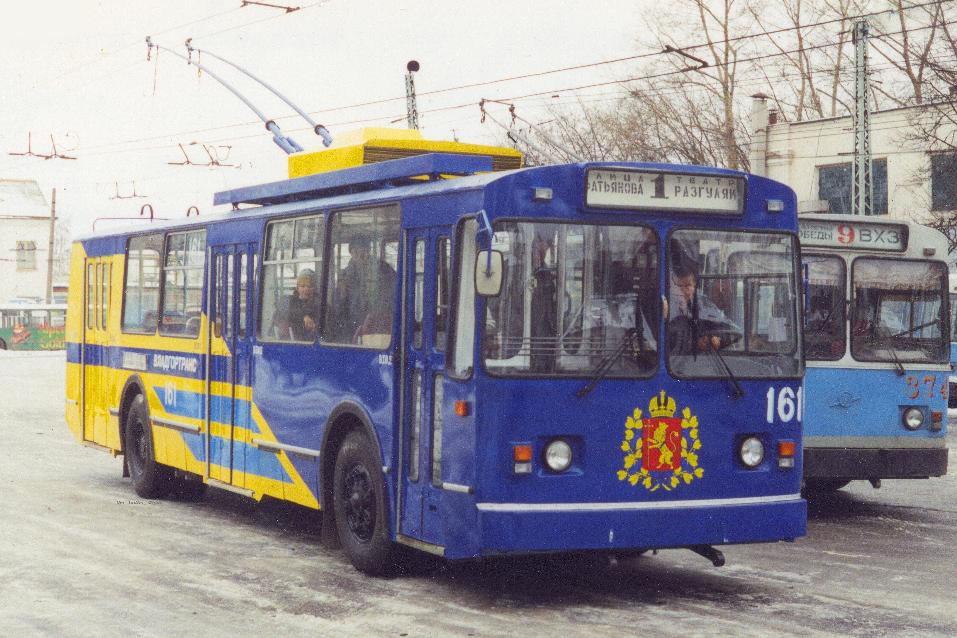 ВМЗ-170 № 161 во Владимире